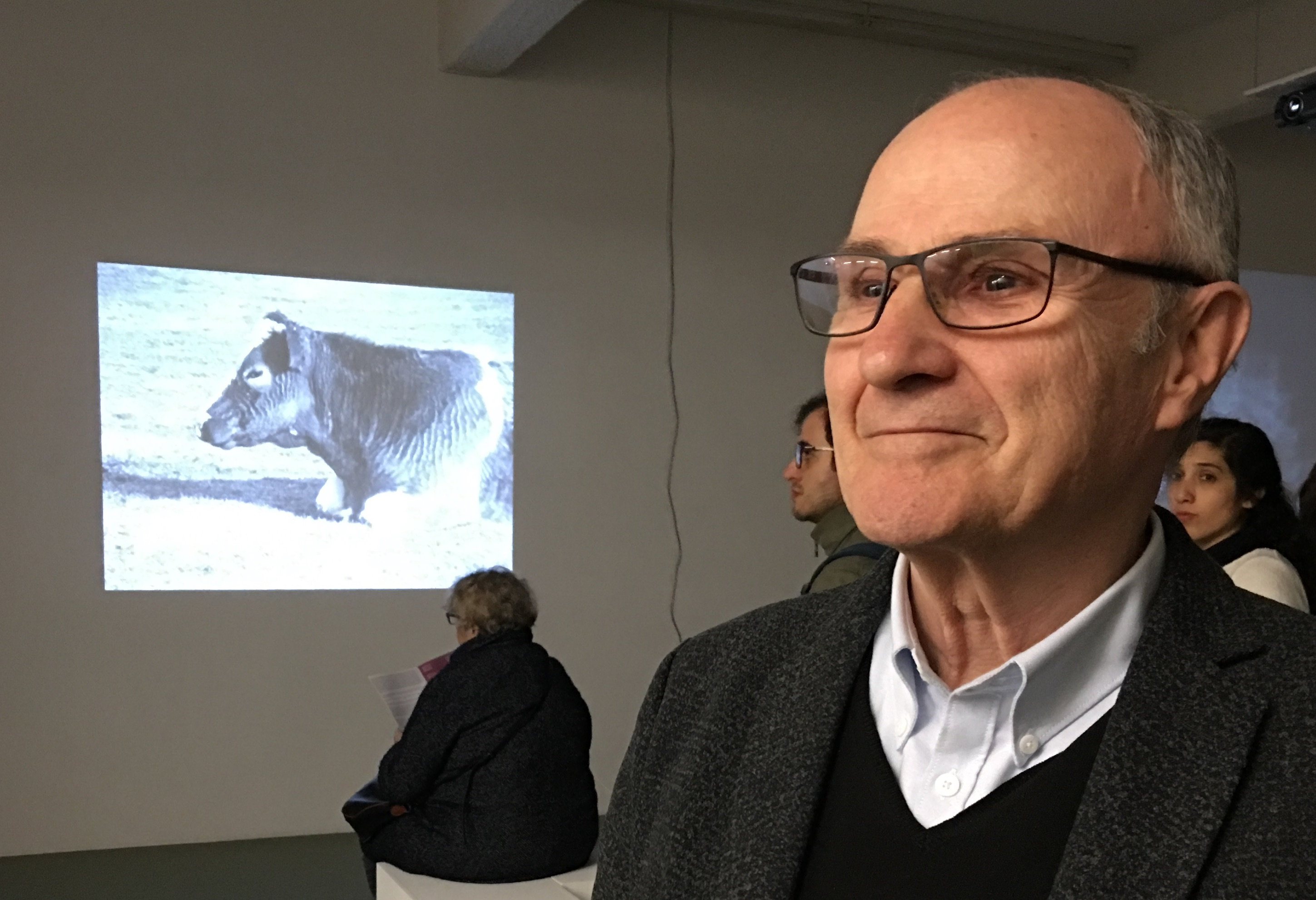 La photographie a été réalisée lors d'une exposition à la laquelle il participait, en arrière plan son film "La vache qui rumine" est projeté.